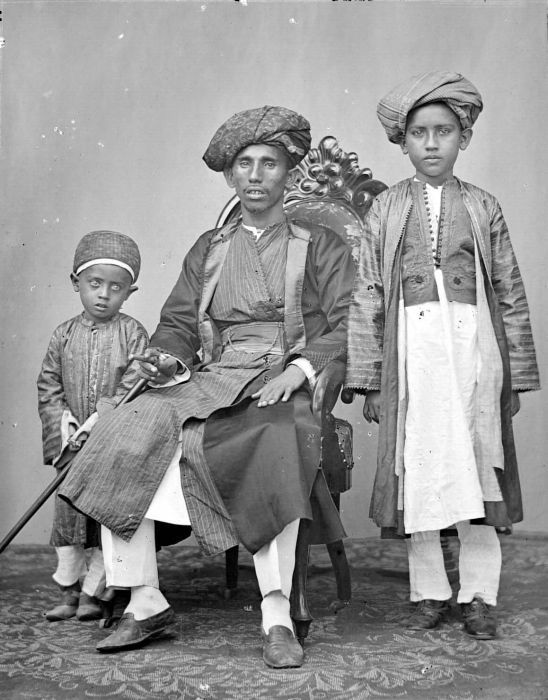 Negatief. Portret van het hoofd van de Arabieren te Tegal, Java